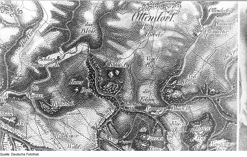 Original image description from the Deutsche Fotothek Kirnitzschtal-Ottendorf. Oberreit, Sect. Stolpen, 1821/22